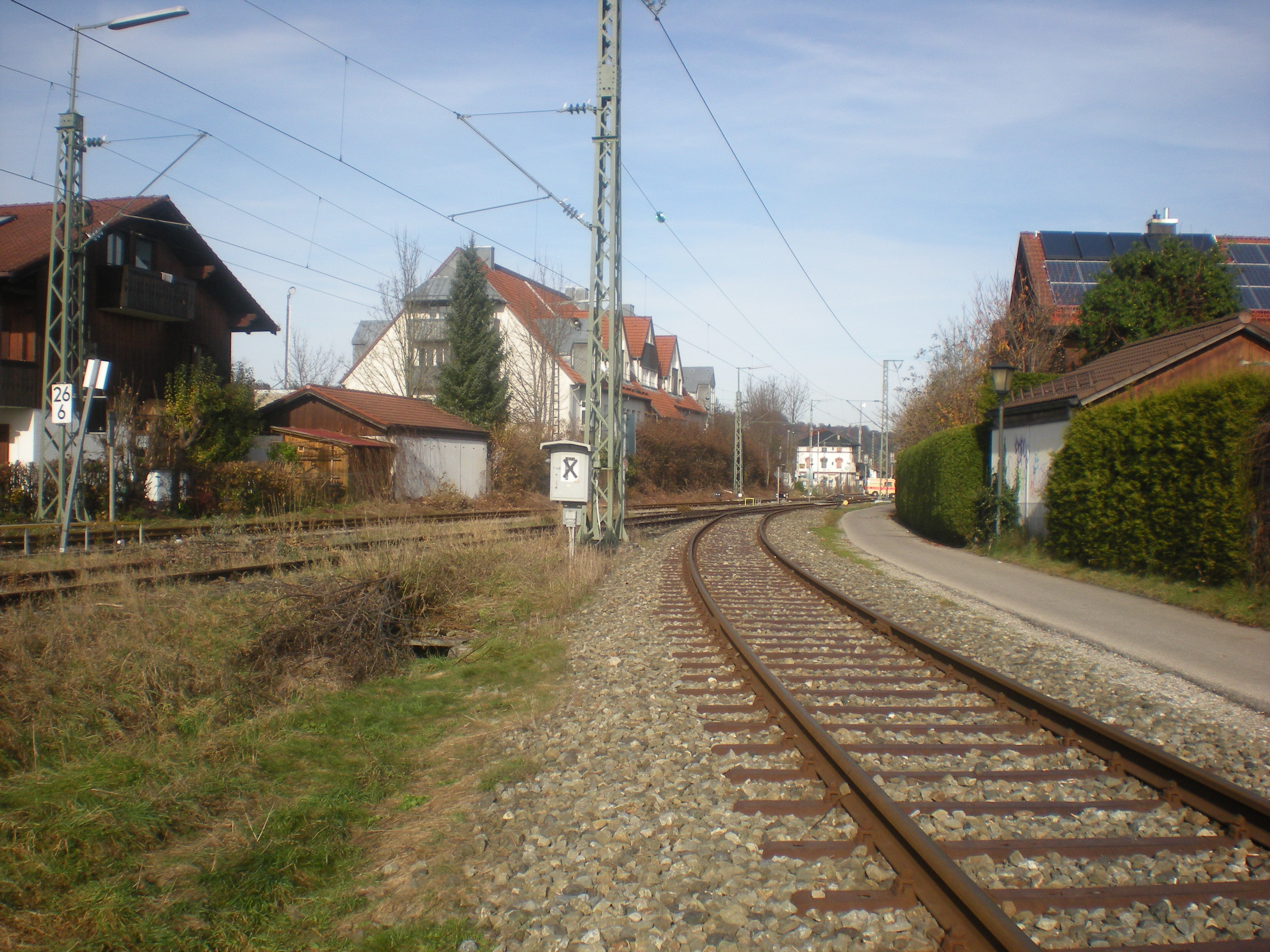 Abzweig des Anschlussgleises nach Geretsried von der Isartalbahn in Wolfratshausen, im Hintergrund das Wolfratshausener Empfangsgebäude